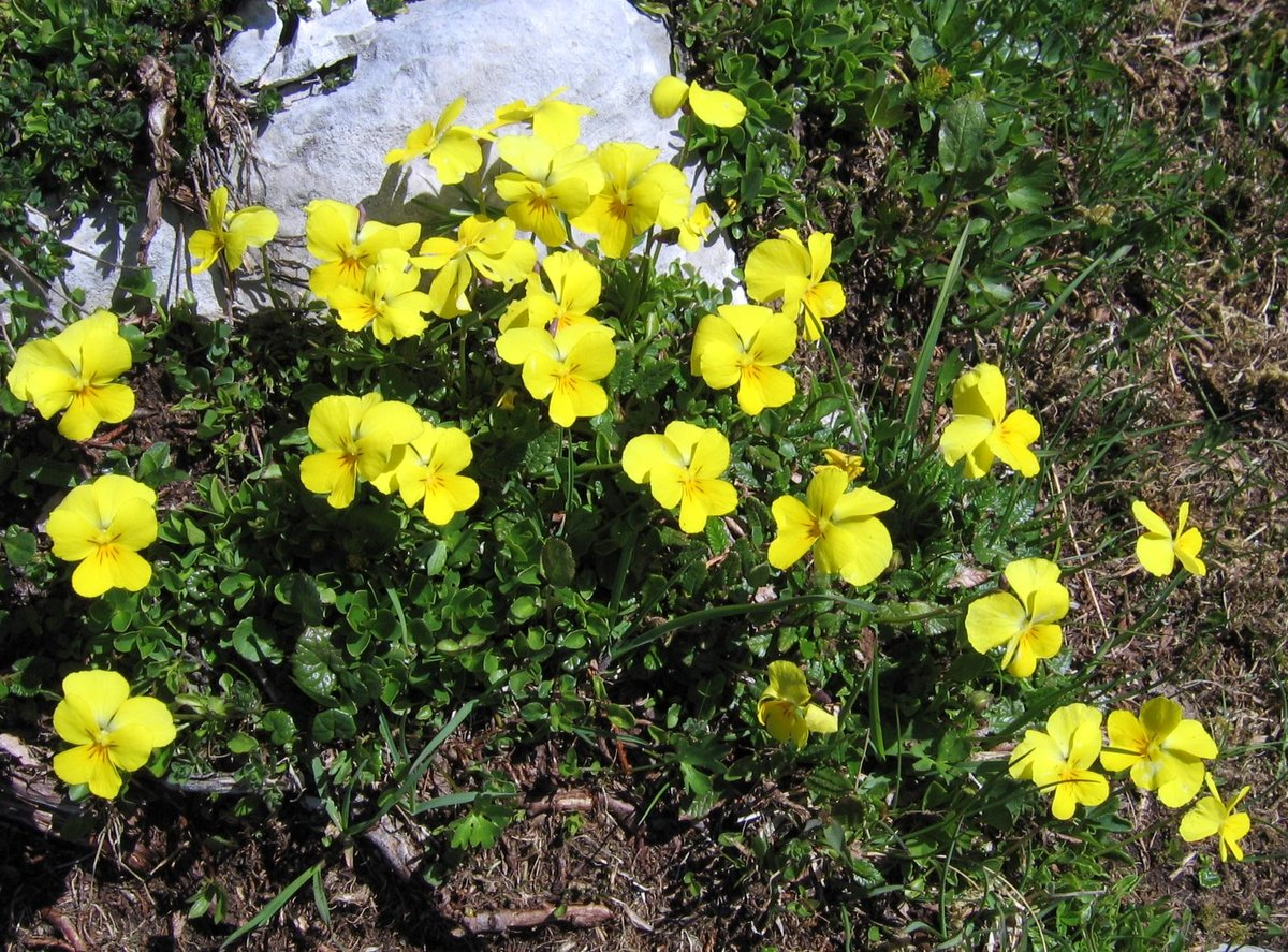 Zoisova vijolica na Stolu.